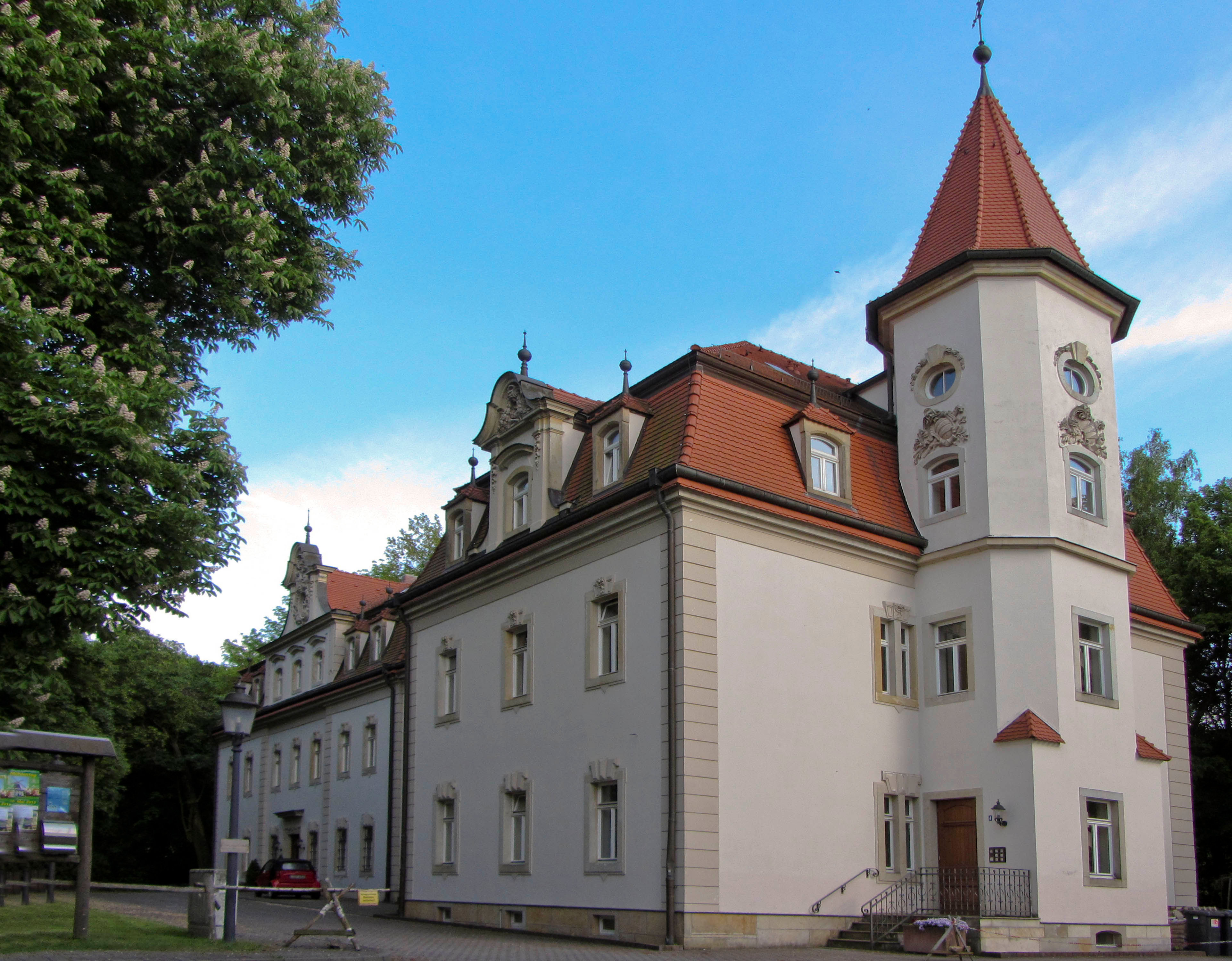 Schloss Dornreichenbach, Philipp-Müller-Platz 4 in Lossatal OT Dornreichenbach